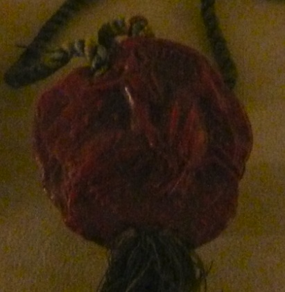 Pečeť Roberta I. z Baru